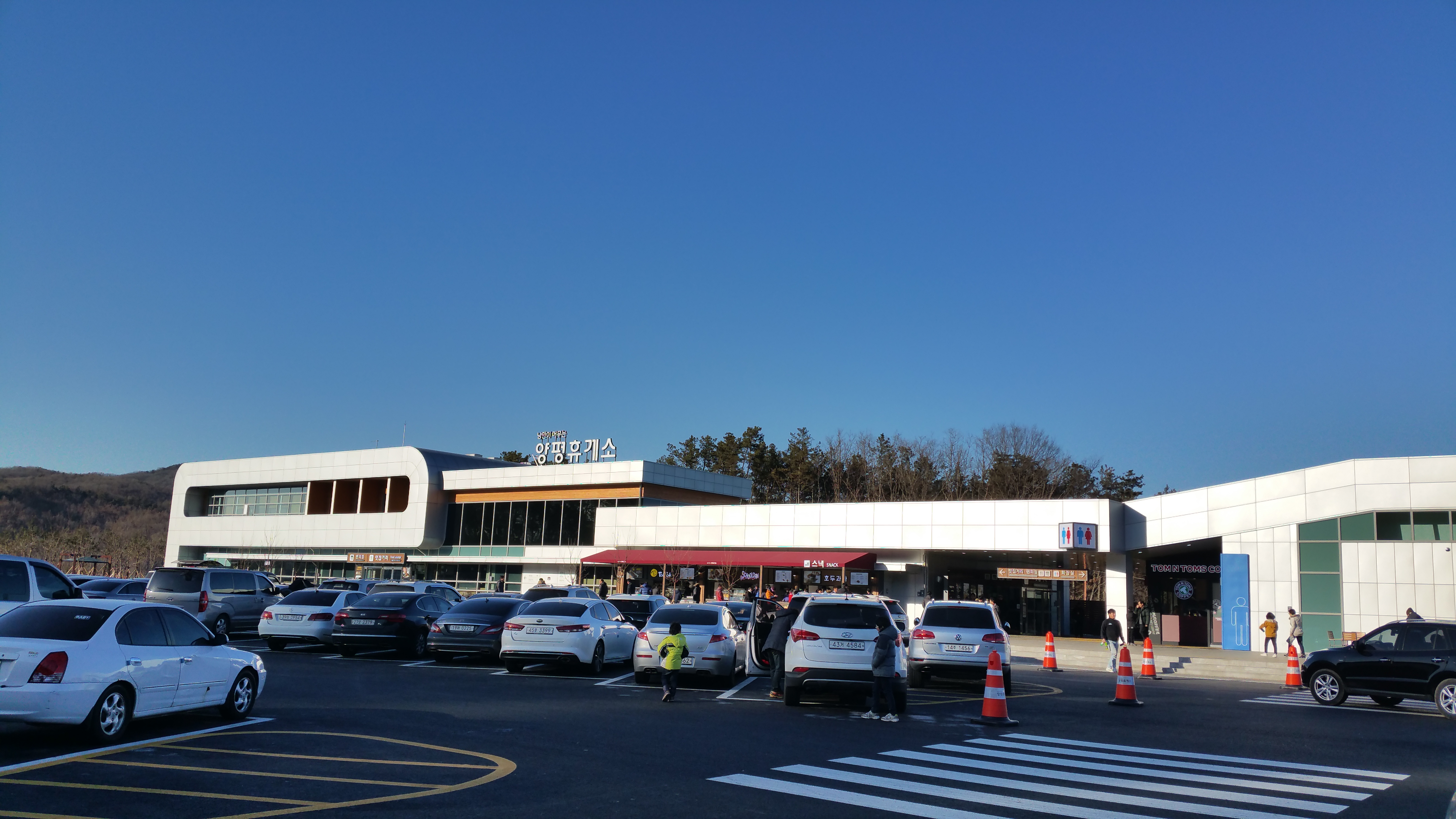 광주원주고속도로 양평휴게소 (광주 방향)